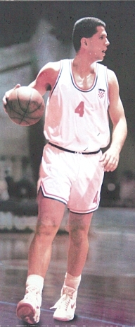 Dražen Petrović amb samarreta amb escut croata.